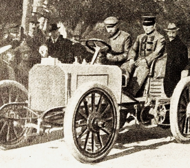 Wilhelm Werner, vainqueur de Nice-Salon-Nice en 1901 sur Mercedes 35 hp (1ère victoire non française sur le territoire national) - La Vie au Grand Air du 31 décembre 1903, p.978